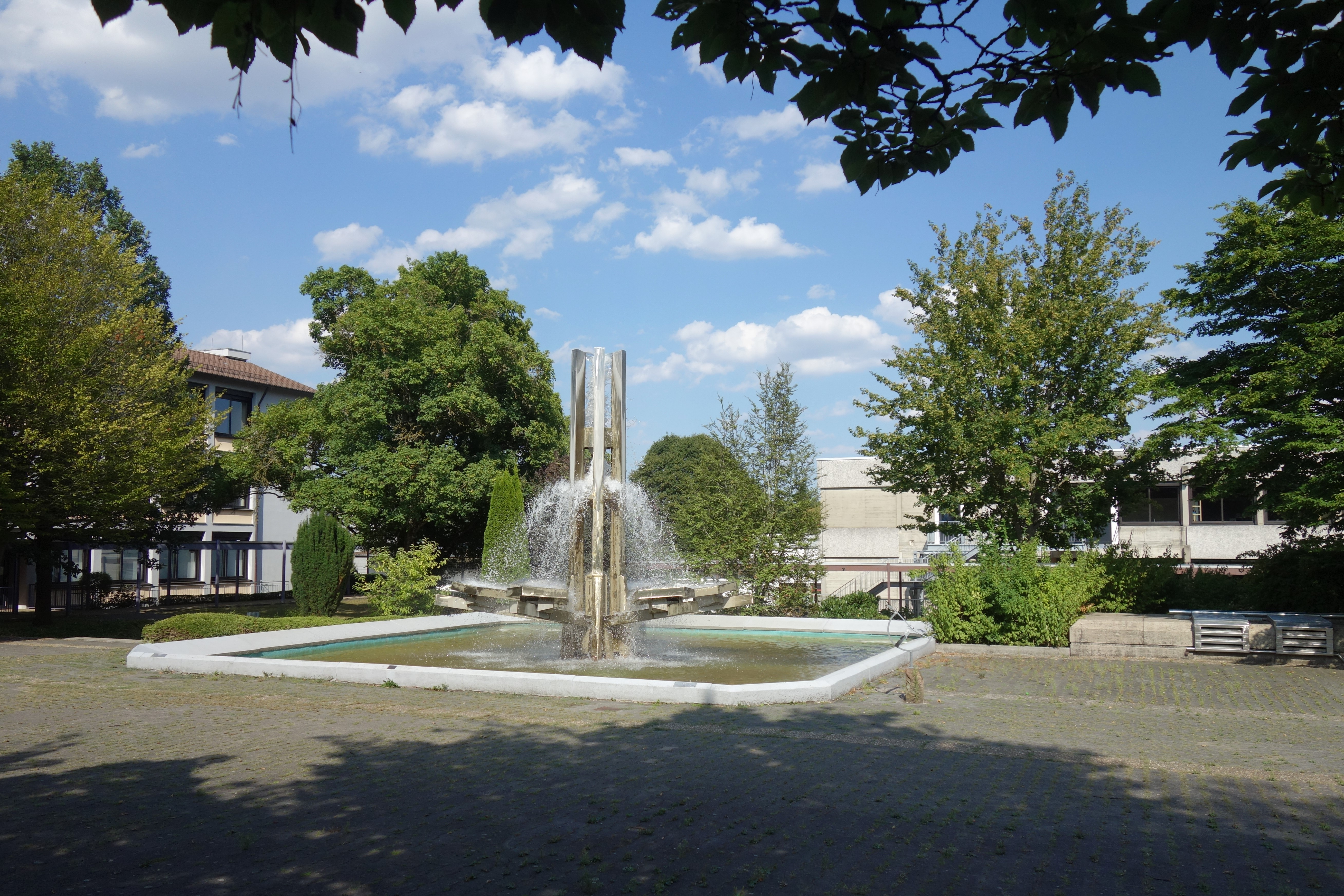 Oberer Schulhof mit Gebäuden A und D.